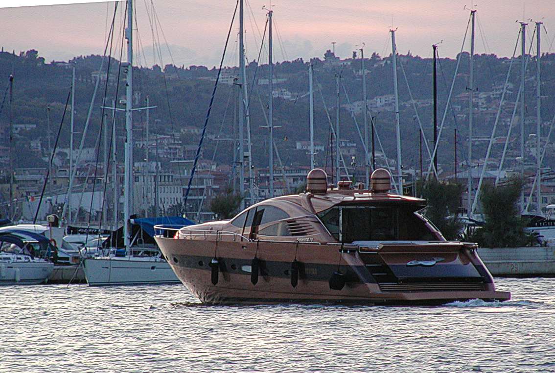 Pershing 76, Porto di Pescara.